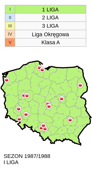 Jagiellonia w sezonie 1987/88 mapa